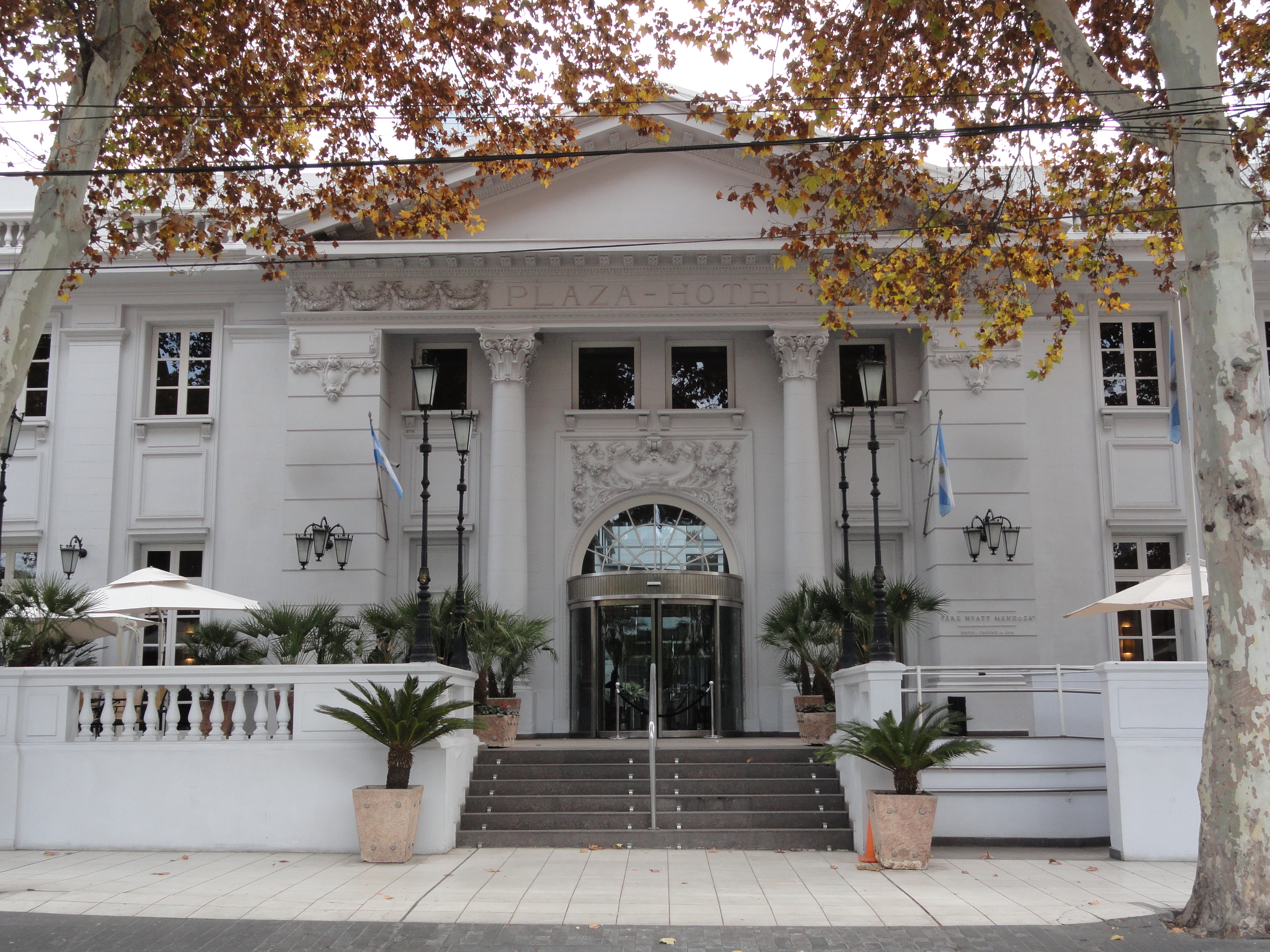 Hotel Plaza (actual Park Hyatt Hotel)